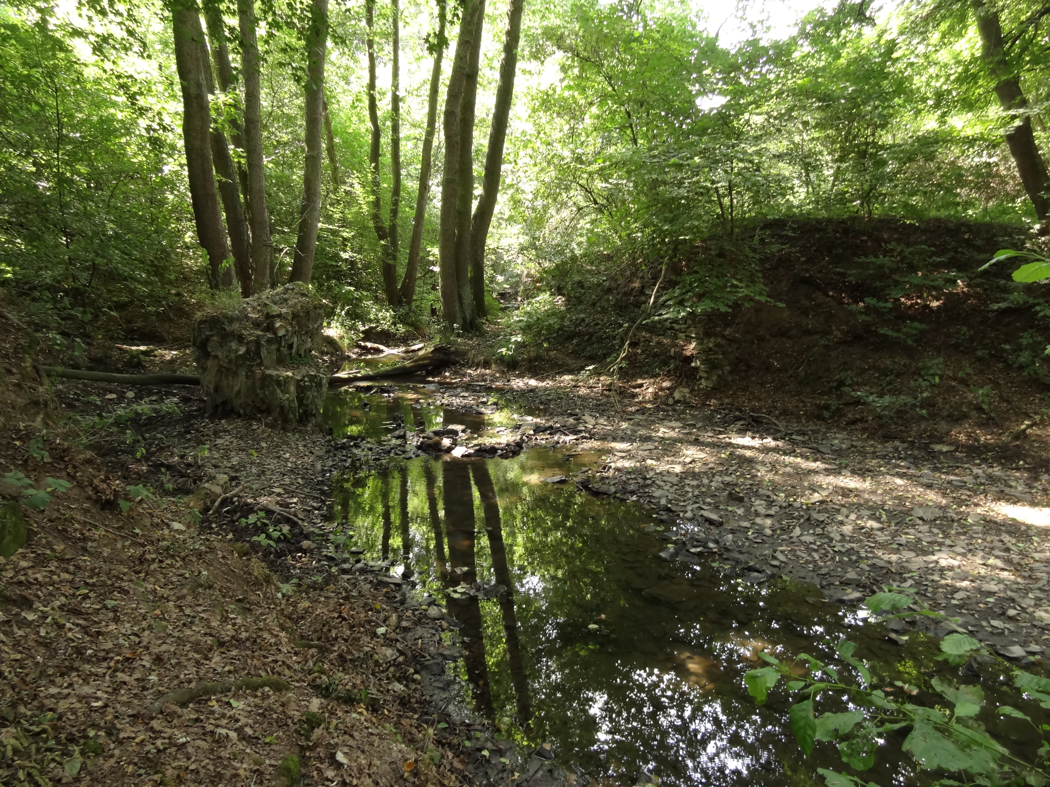 Přírodní památka Králičina a Povýmolí - zbytky mostu a rybniční hráze v místě zvaném Starý splav